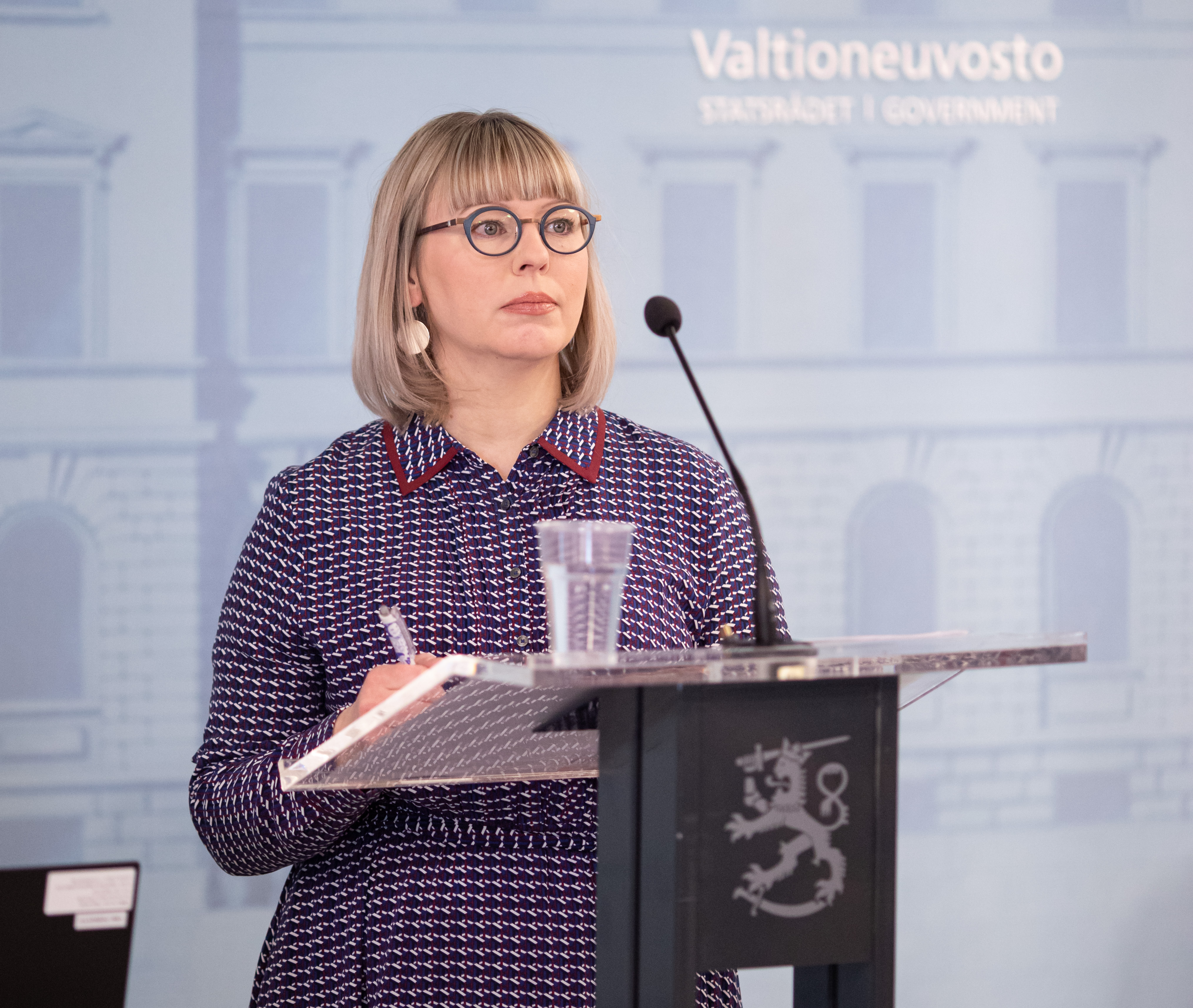 © Lauri Heikkinen | valtioneuvoston kanslia